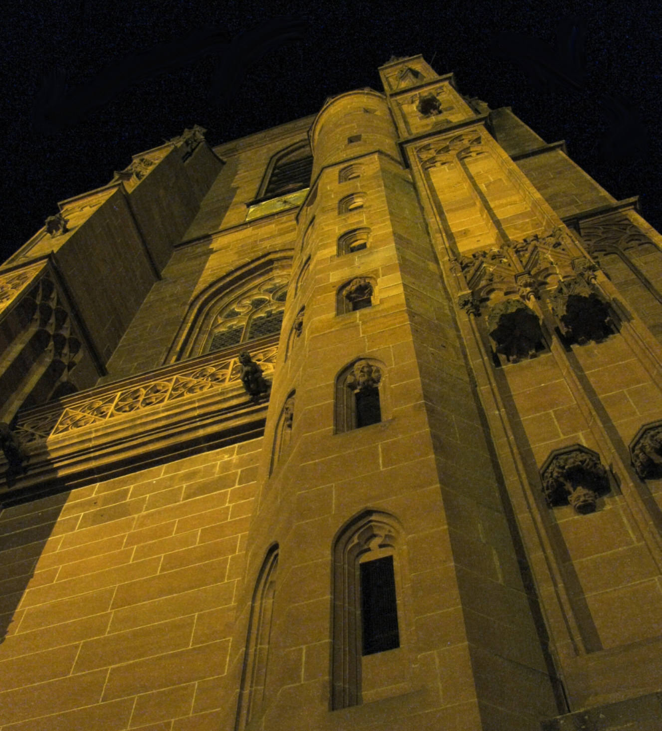 Wetzlarer Dom, Privatarchiv